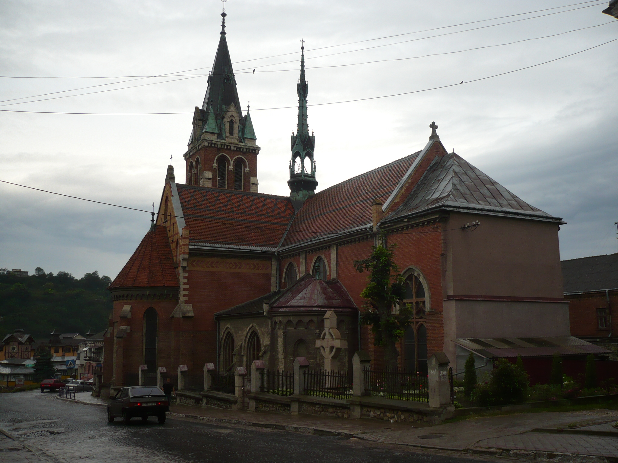 Czortków. Kościół pw. św. Stanisława